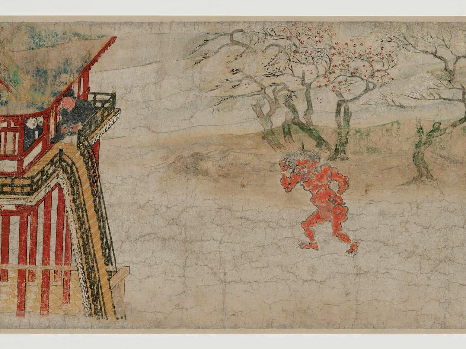 Rouleau 2, le fantôme d'Abe no Nakamaro vient aider le ministre Kibi retenu dans une tour du palais impérial chinois sous la forme d'un démon.